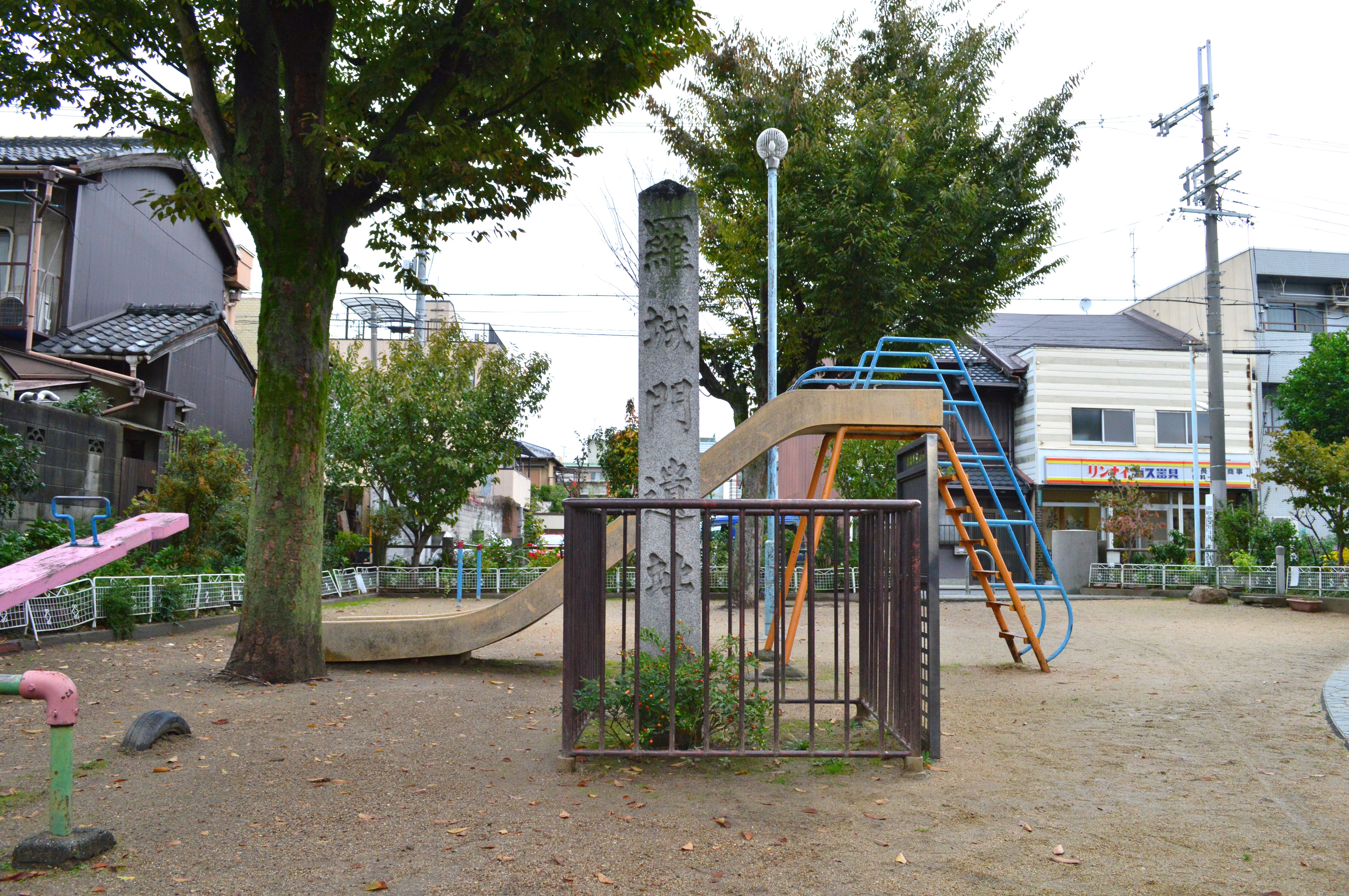 平安京 羅城門遺阯碑